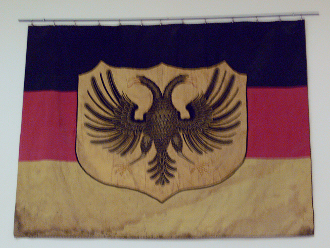 Rathaus in Ravensburg Fahne der Ravensburger Bürgerwehr, geweiht am 3. Juni 1849